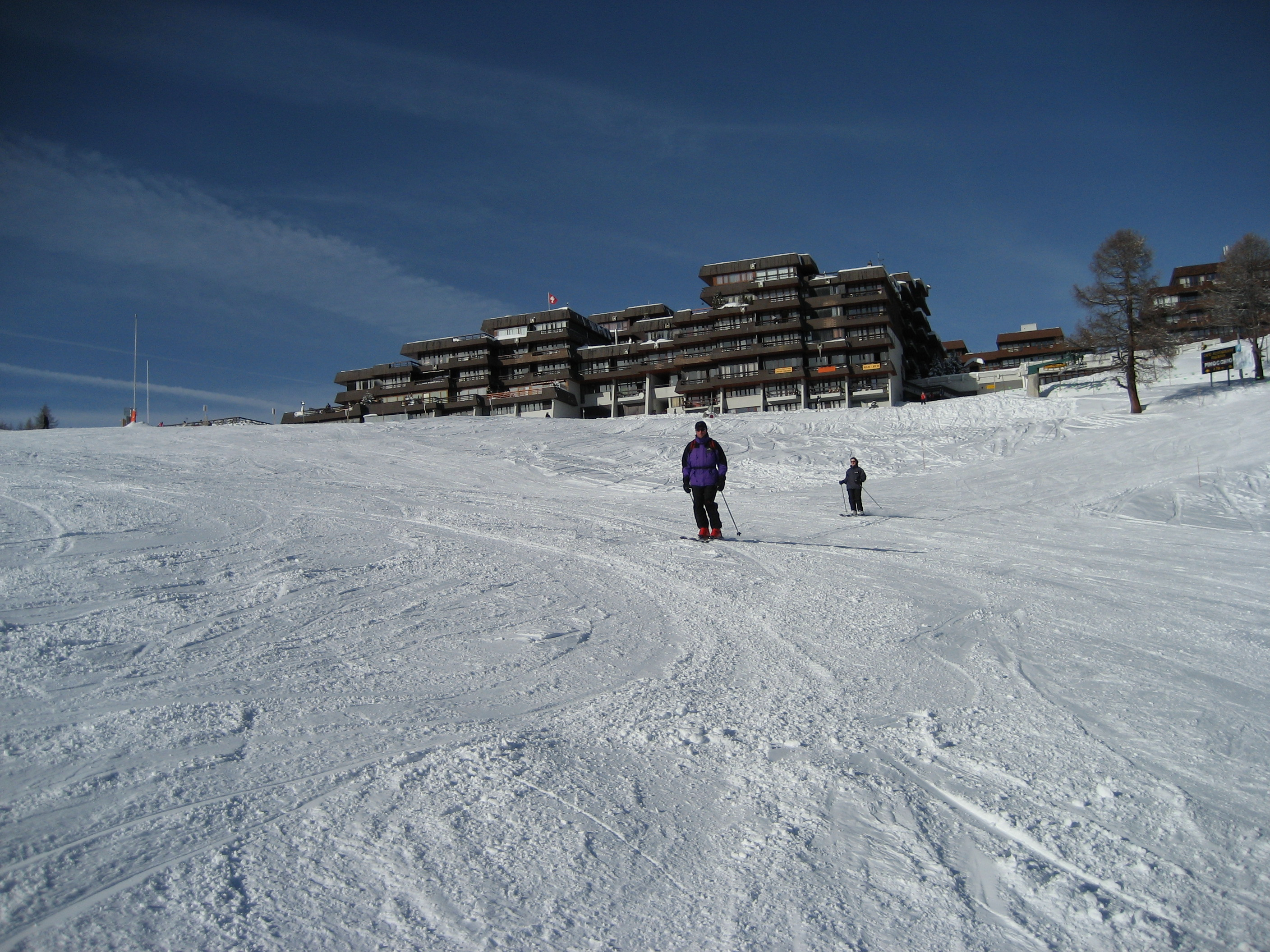 Thyon 2000 VS Schweiz